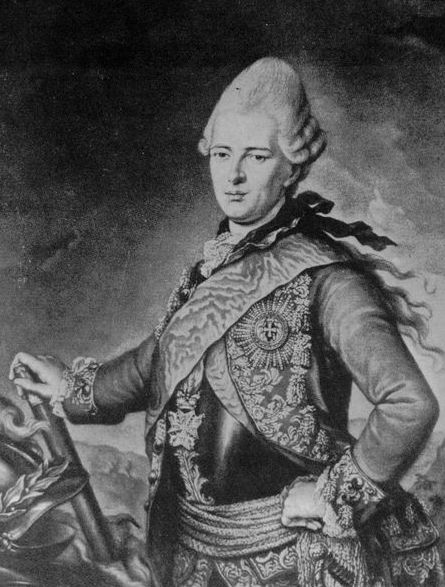 Karl von Hessen-Kassel